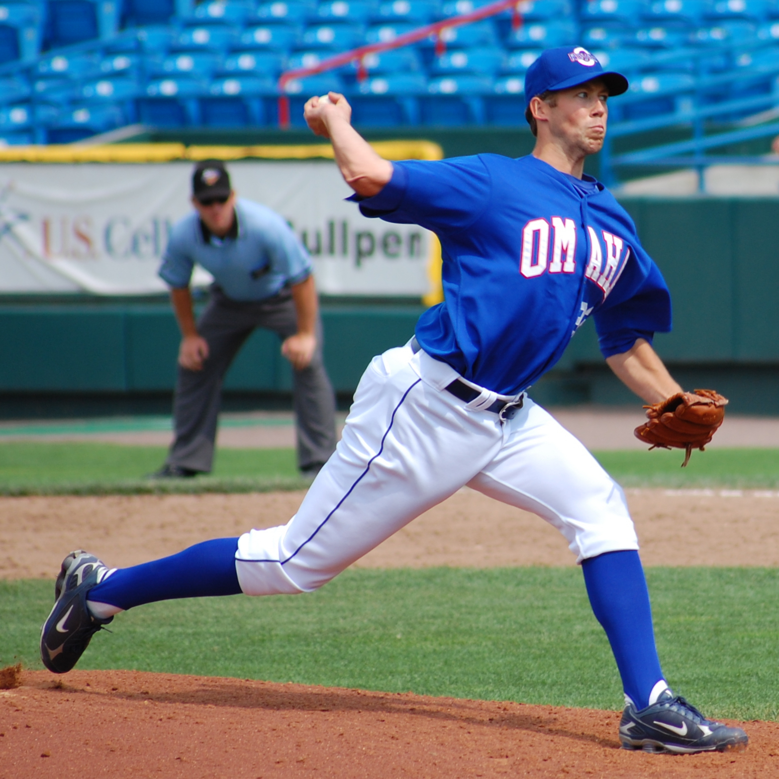 Bryan Bullington